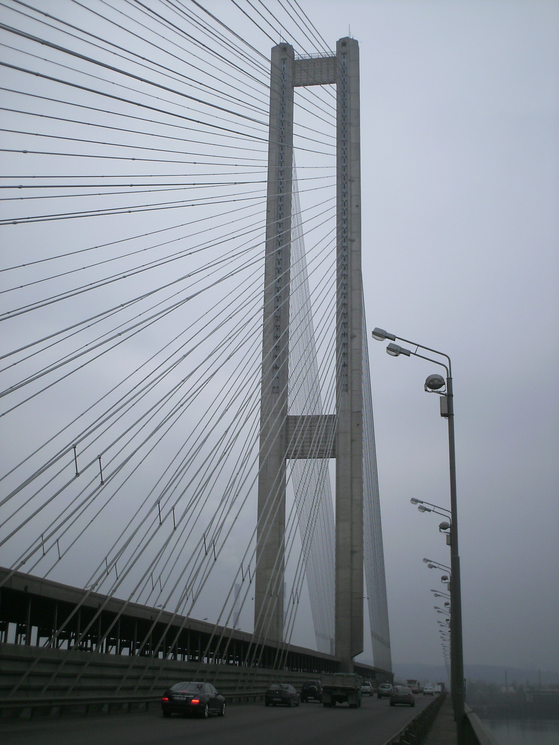 Південний міст у Києві: Південний міст у Києві, північний бік, вид на правий берег